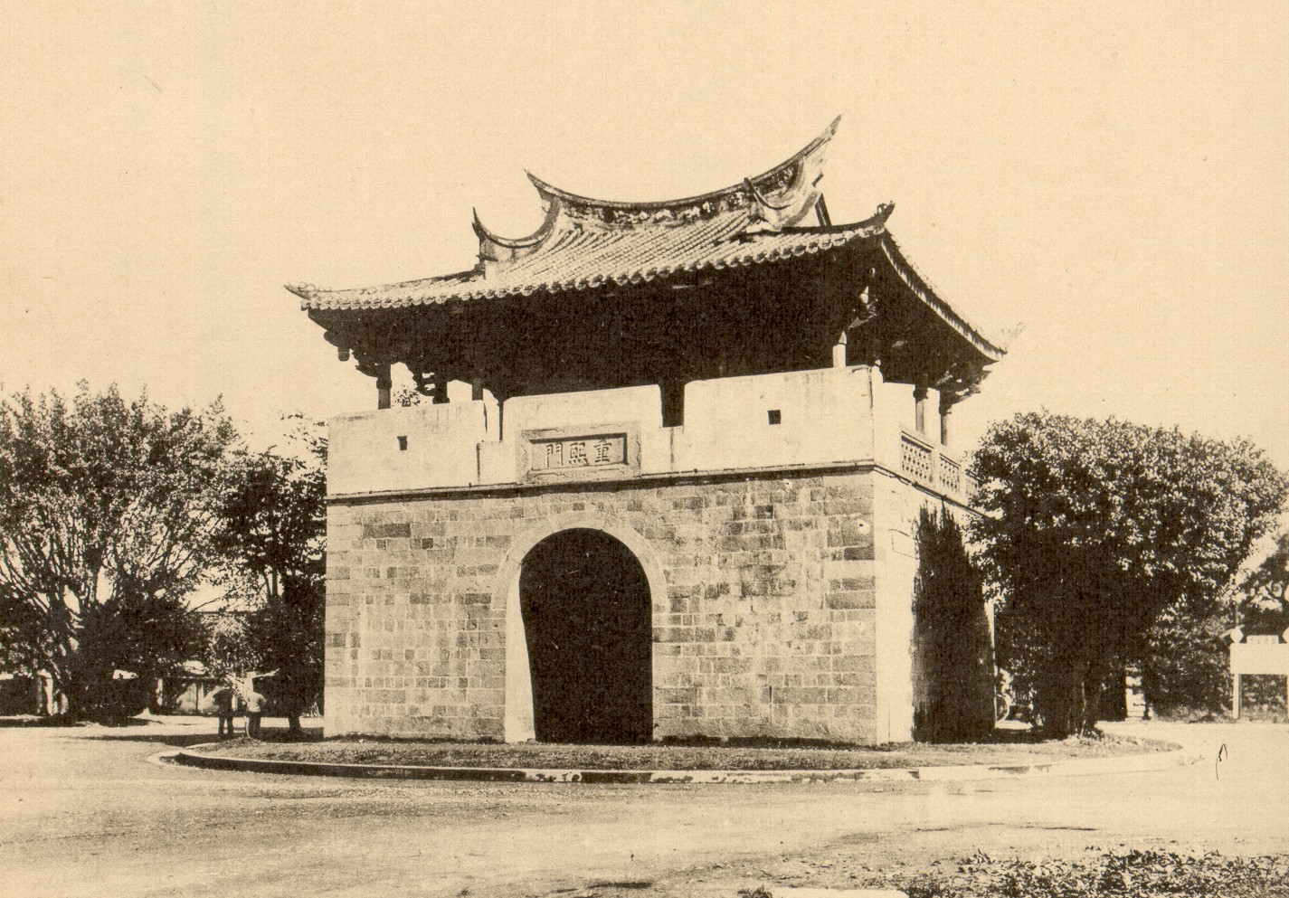 中文（台灣）: 改建前的臺北府城小南門，拍攝時間為日據時代。